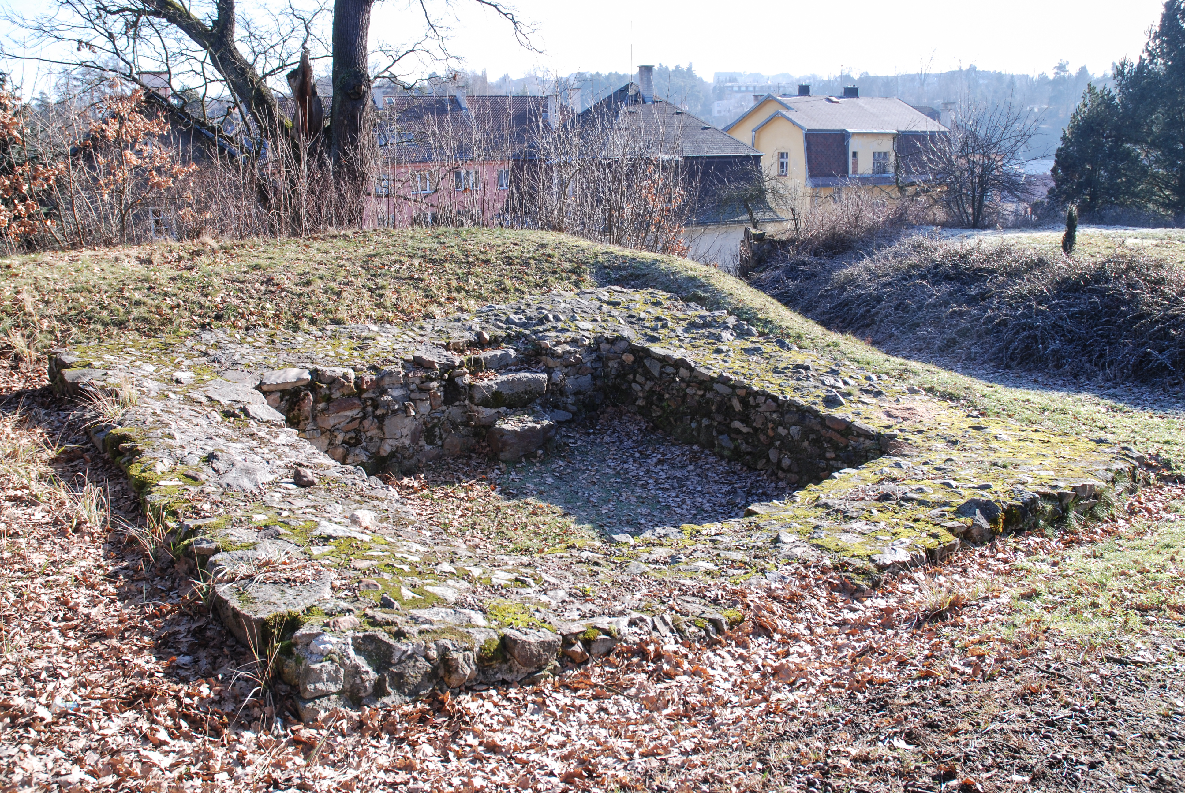 Tvrziště v Dalovicích (u Karlových Varů), pozůstatky kamenné stavby v místě kdysi nazývaném Hausberg, někdy také Kellerbergl